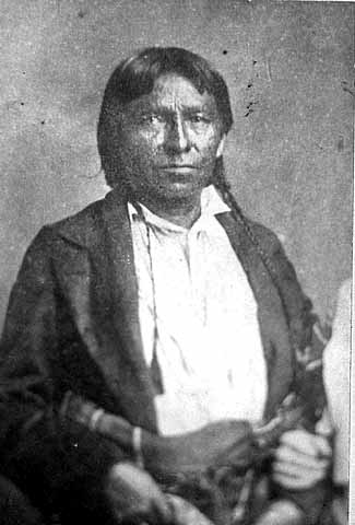 Wapasha III.